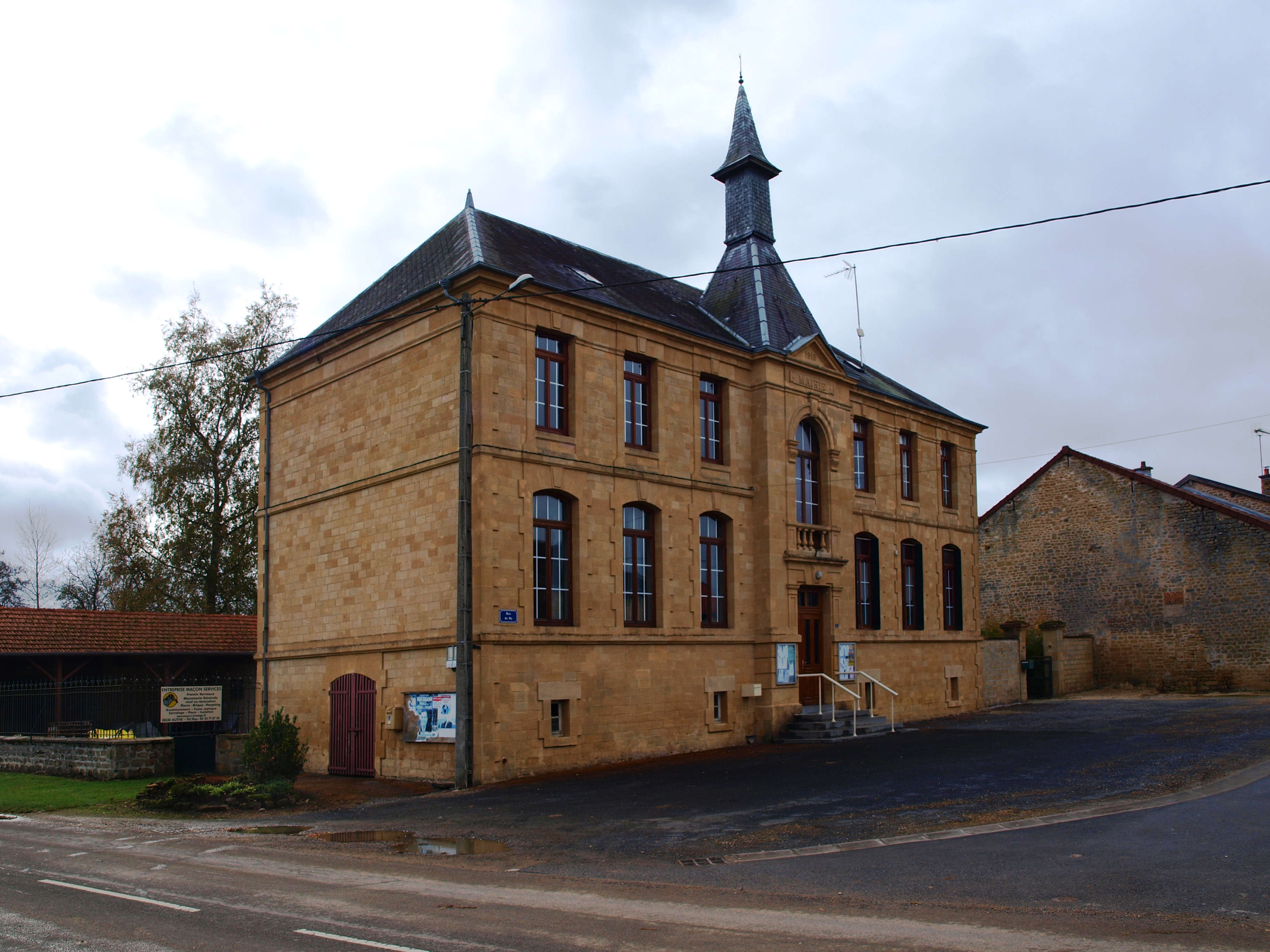 Authe (Ardennes, France) ; mairie